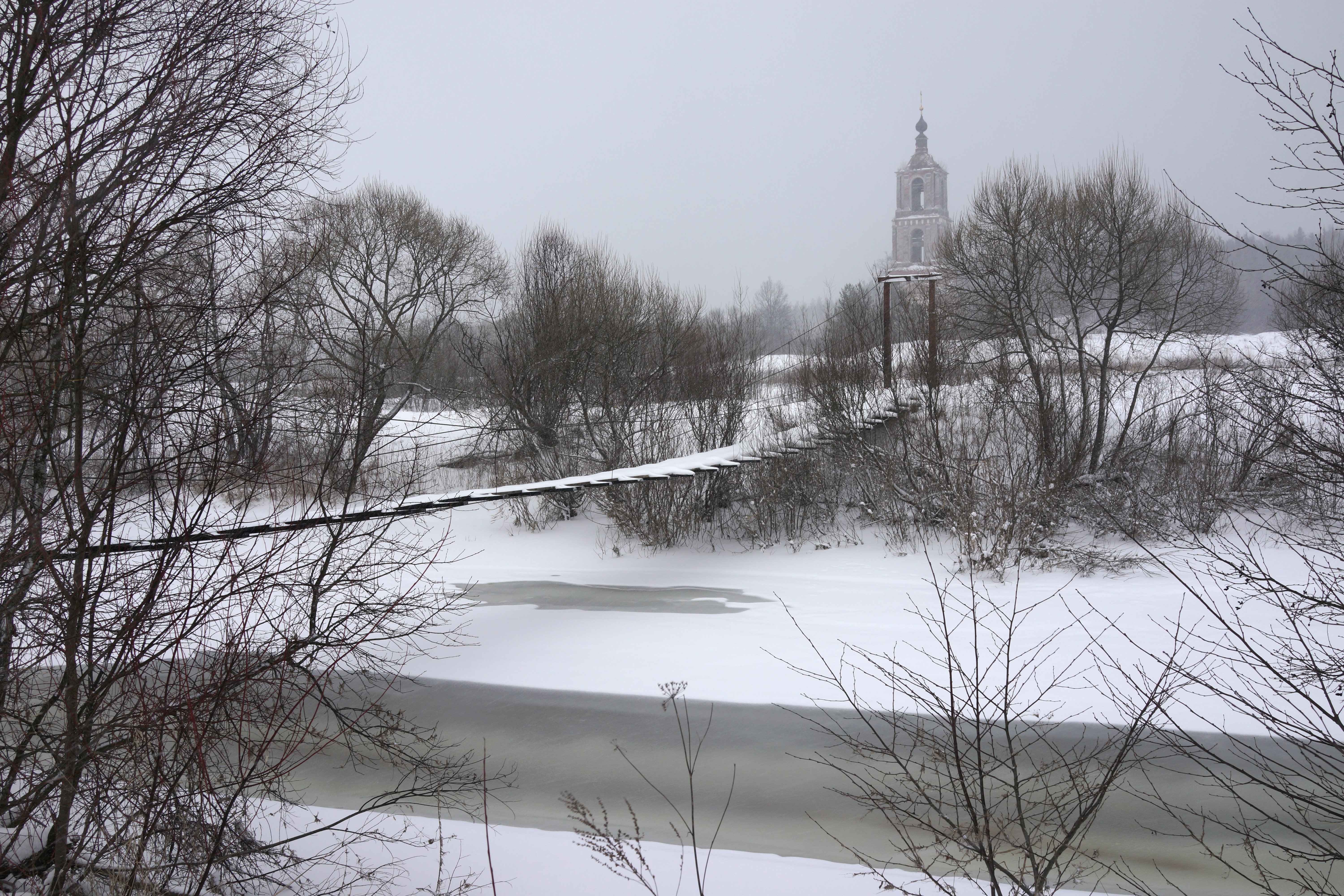 Вид со стороны реки Киржач на урочище Аргуново